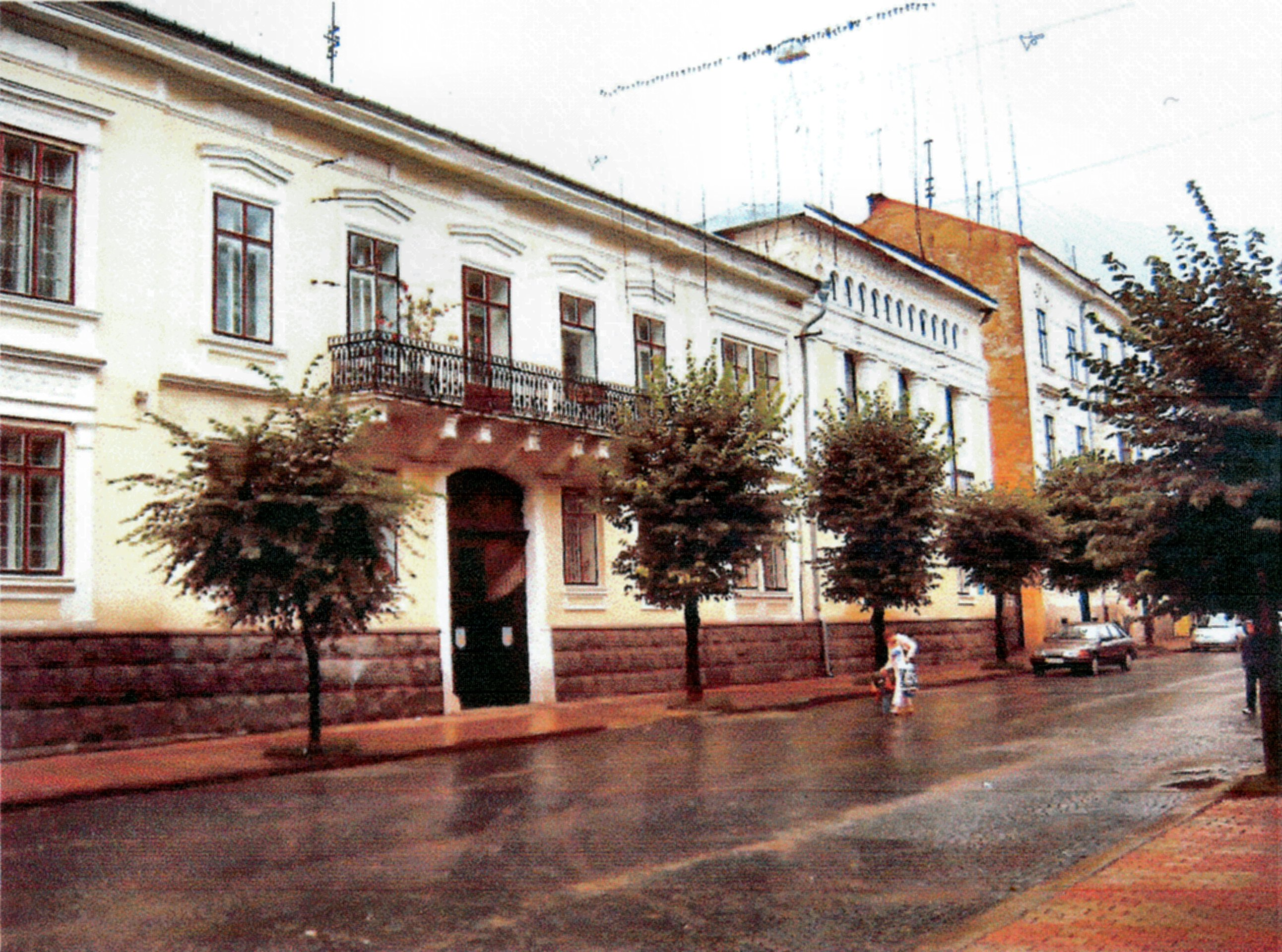 Wassilko-Palais von 1886 in Czernowitz, Herrengasse 38 (Teilansicht)